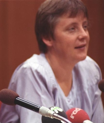 BER 17 / 3.8.90 / Berlin: De Maiziere für Oktober-Wahltermin DDR-Ministerpräsident Lothar de Maiziere (CDU/links) hat sich für gesamtdeutsche Wahlen bereits am 14. Oktober 1990 ausgesprochen. Am selben Tag finden in der DDR die Landtagswahlen statt. De Maiziere nannte den Termin auf einer Pressekonferenz in Ost-Berlin. Nach den bisherigen Planungen sollte das gesamtdeutsche Parlament am 2. Dezember 1990 gewählt werden. [rechts Angela Merkel] ADN/Settnik